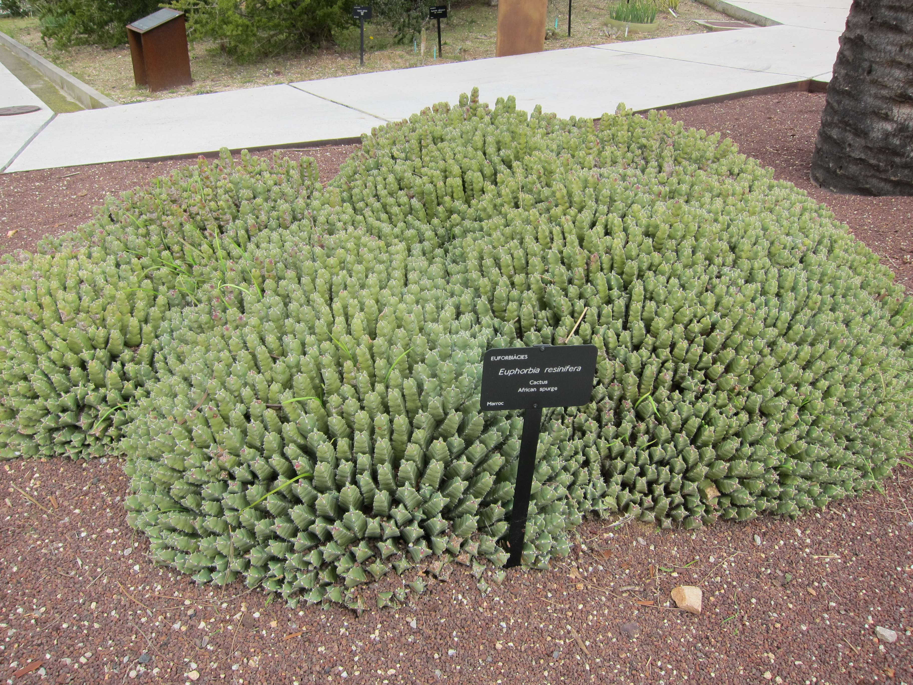 Barcelona, Spain